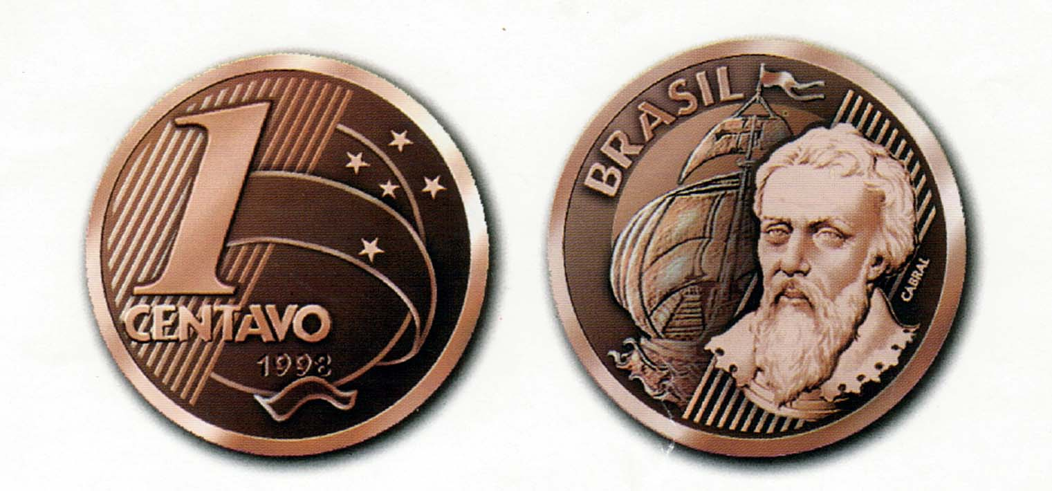 Moeda de 1 centavo da segunda família do real. Esta peça pertence ao acervo da autoria desta imagem.